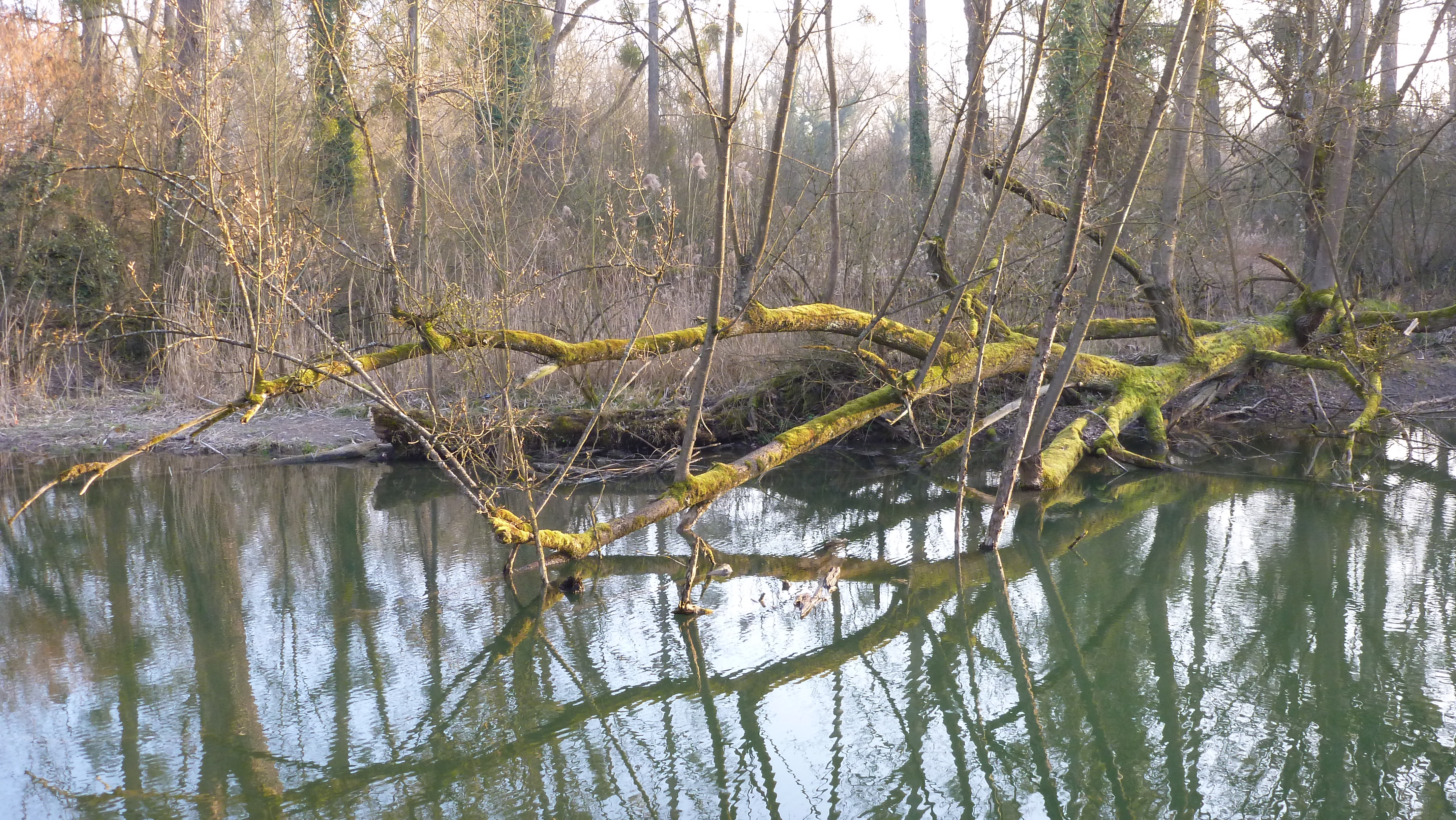 Forêt alluviale du ried alsacien dans la réserve naturelle du Rohrschollen (Strasbourg).